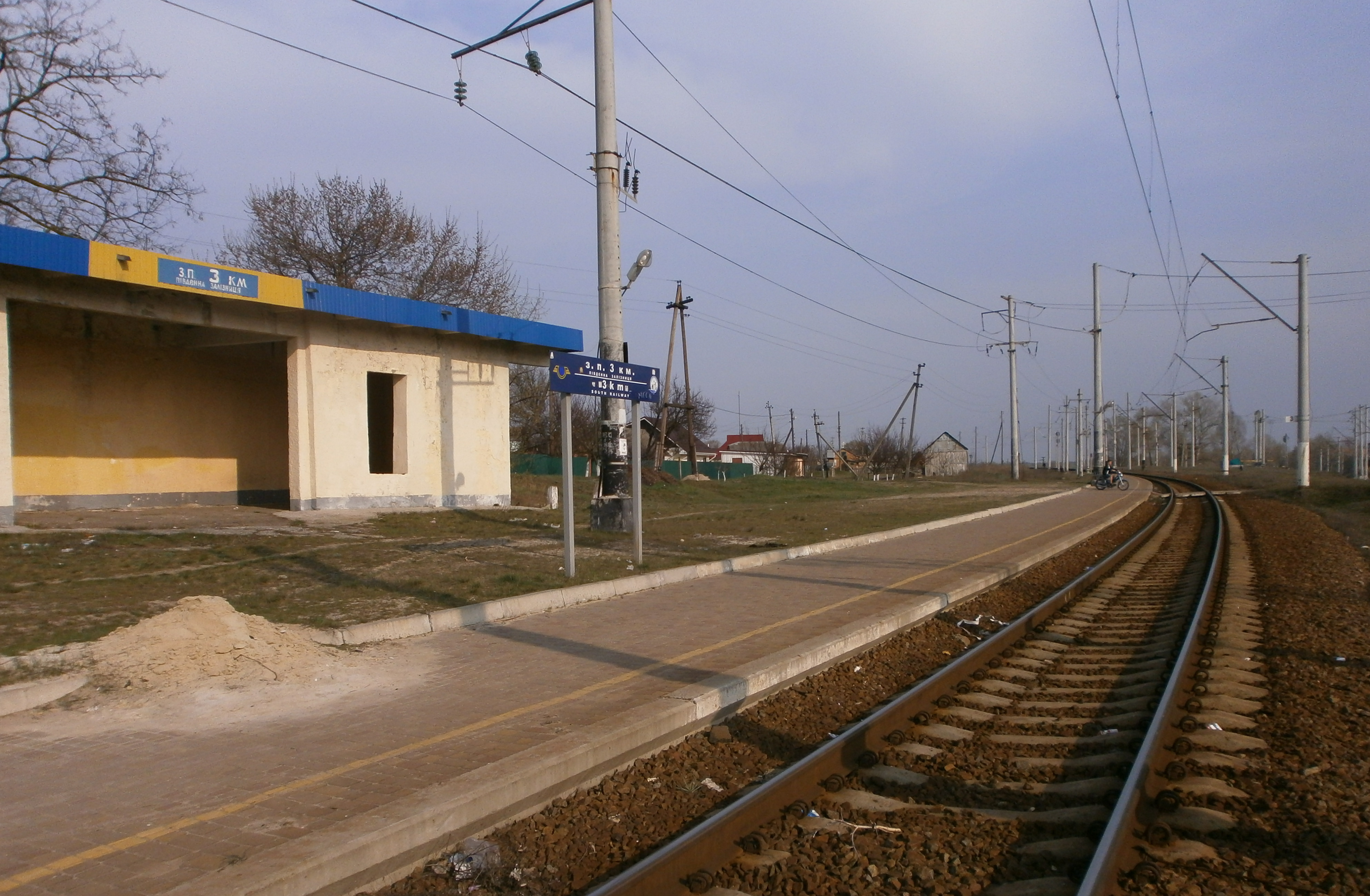 Загальний вигляд зупинного пункту 3 км у Копилах Полтавського району України